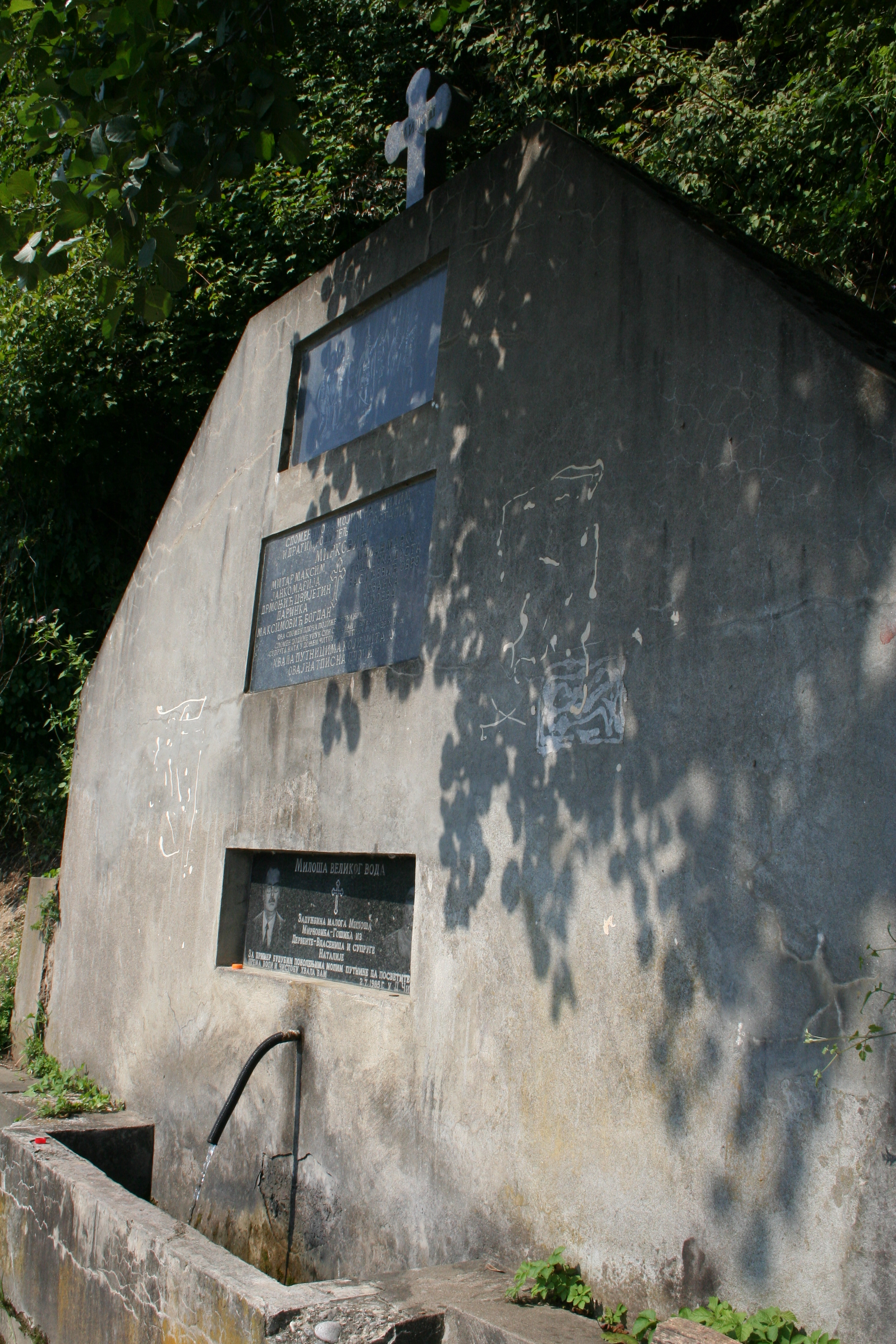 Spomen česma, Čitluk